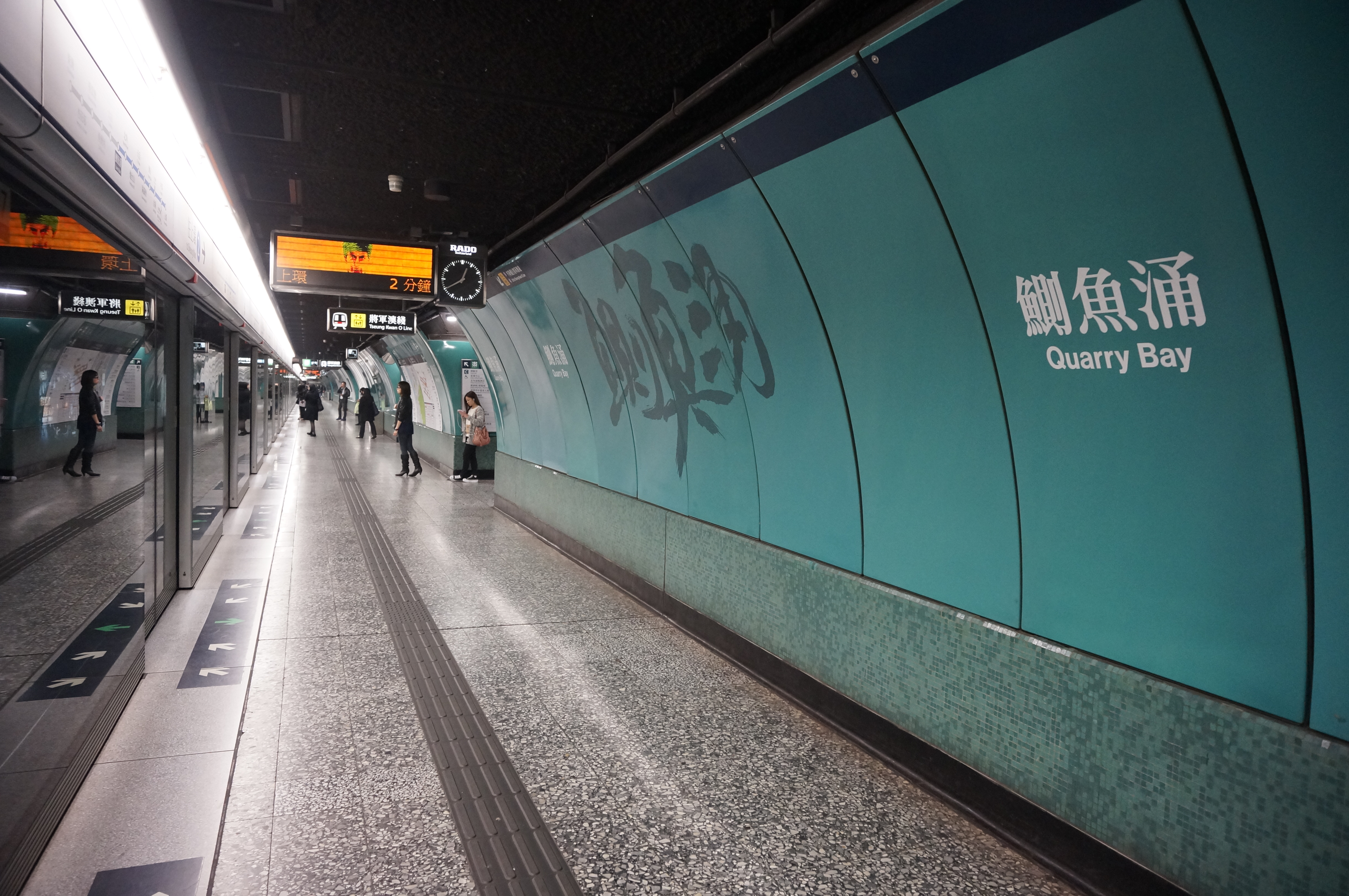 港鐵鰂魚涌站月台